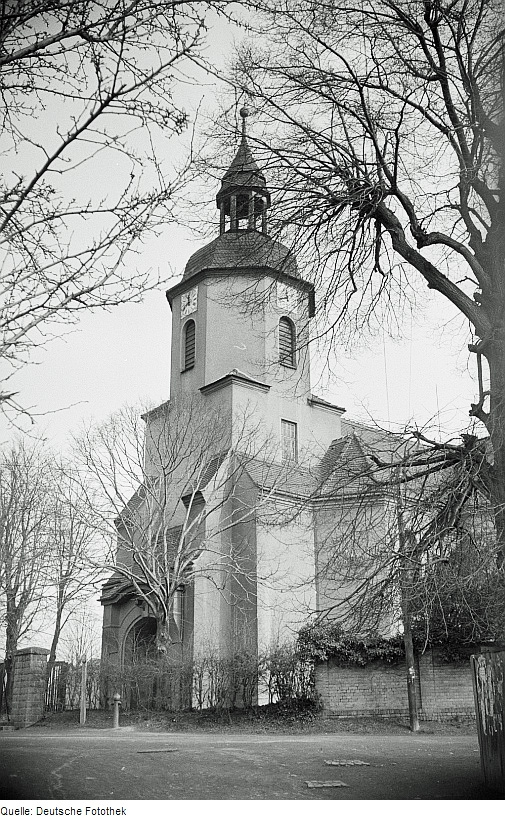 Original image description from the Deutsche Fotothek Außenansicht